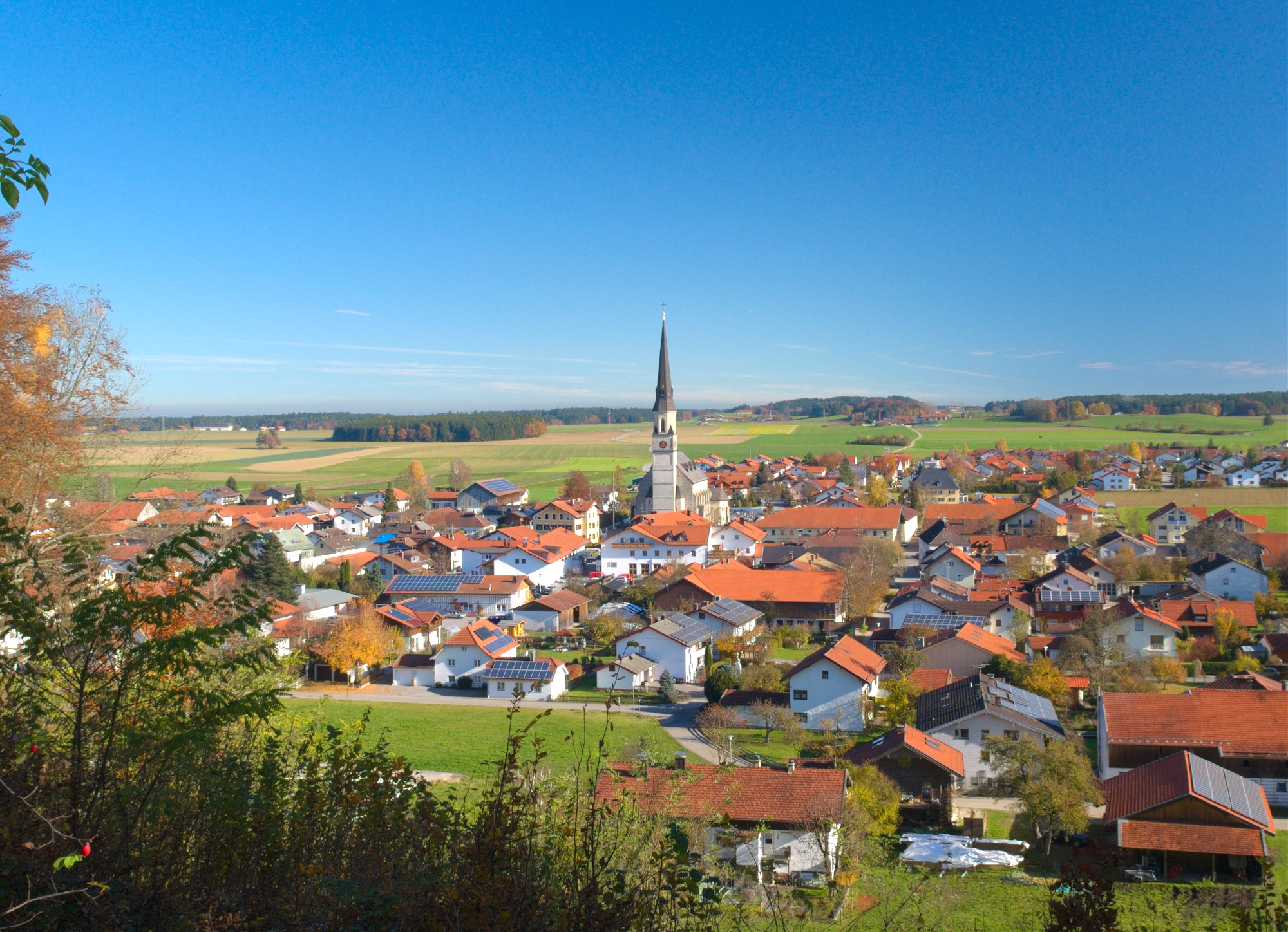 Palling, Landkreis Traunstein, Oberbayern, Ortsansicht vom Kalvarienberg